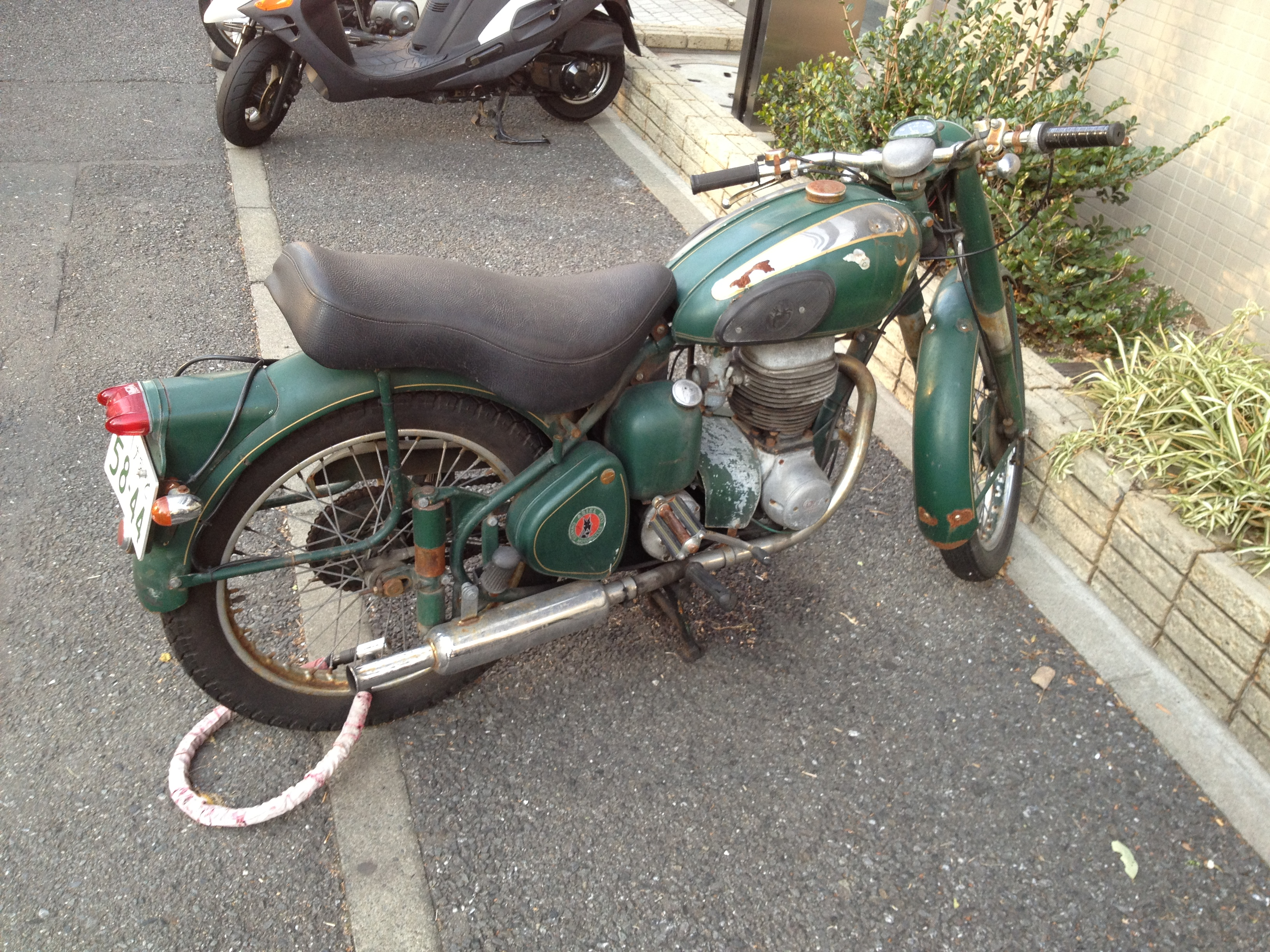 Ariel Colt 200cc 1954